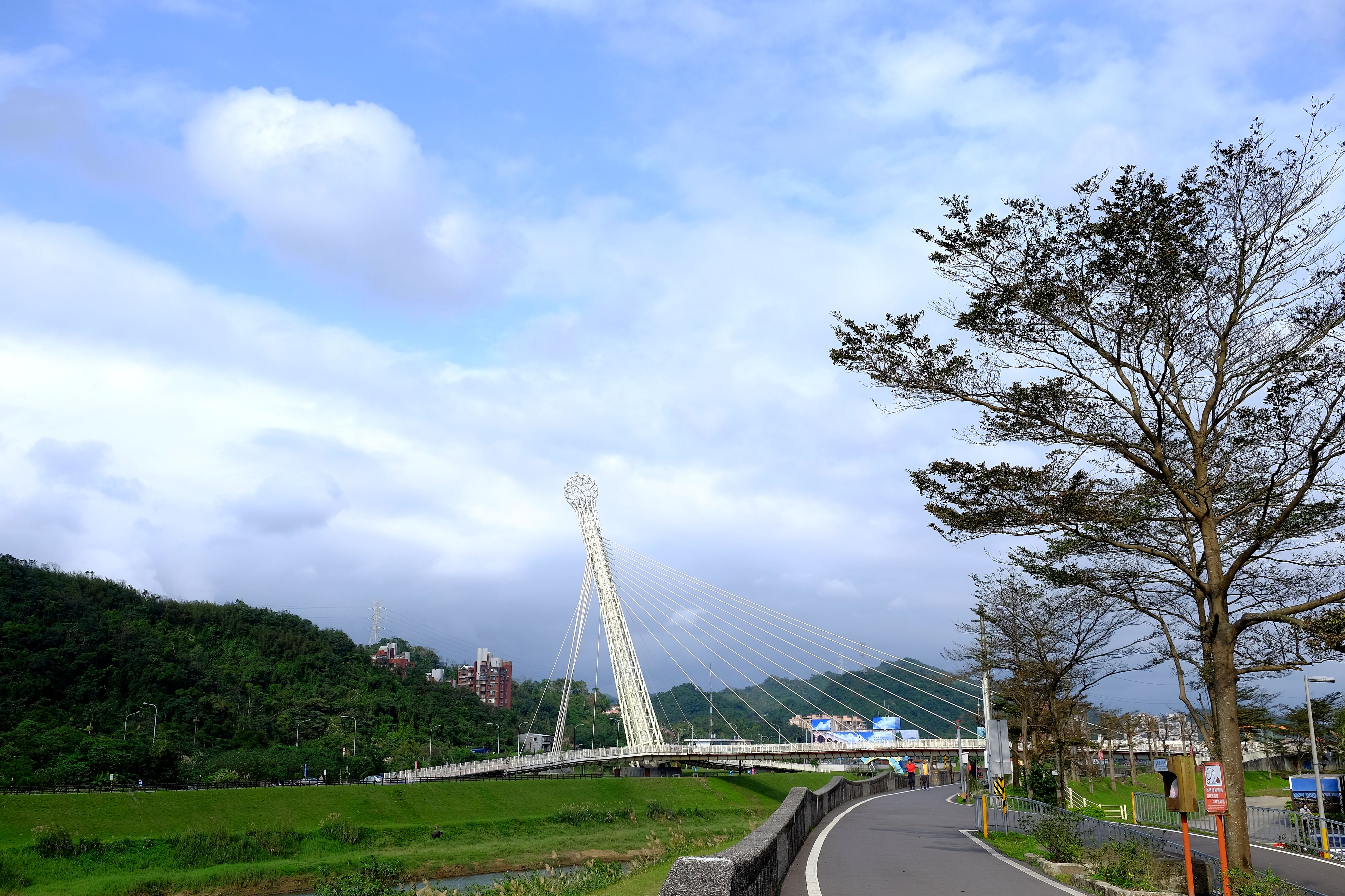 Starlight Bridge (Xizhi)